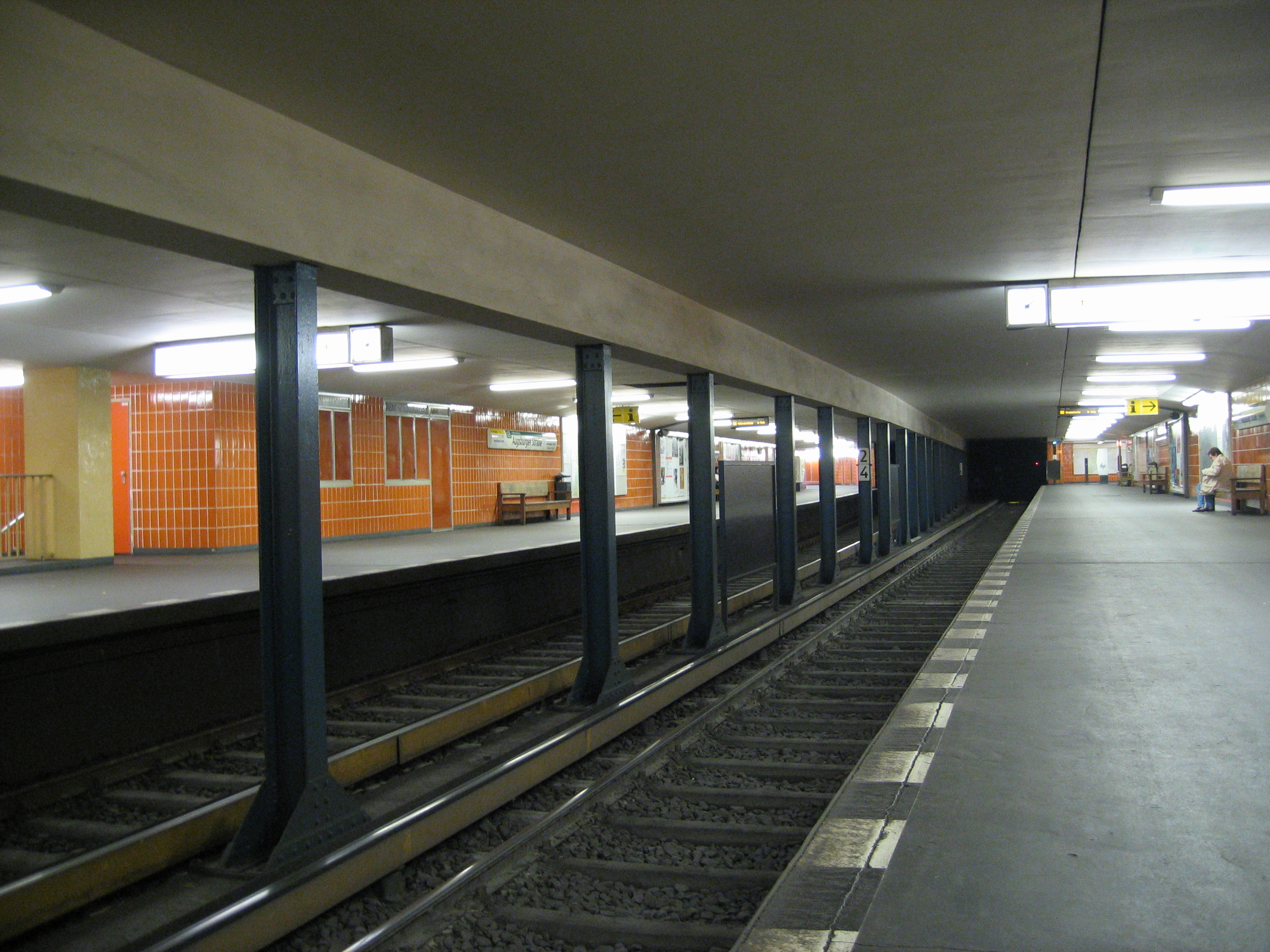 U-Bahnhof Augsburger Straße, Berlin